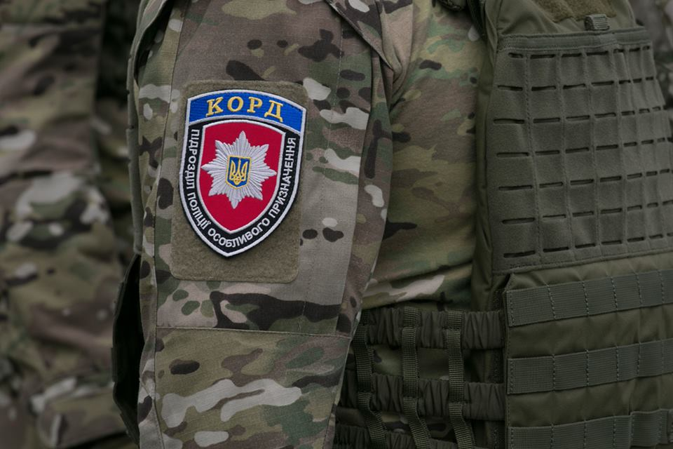 КОРД (укр. Корпус Оперативно-Раптової Дії, рус. Корпус оперативного внезапного действия) — специальное подразделение быстрого реагирования Национальной полиции Украины.